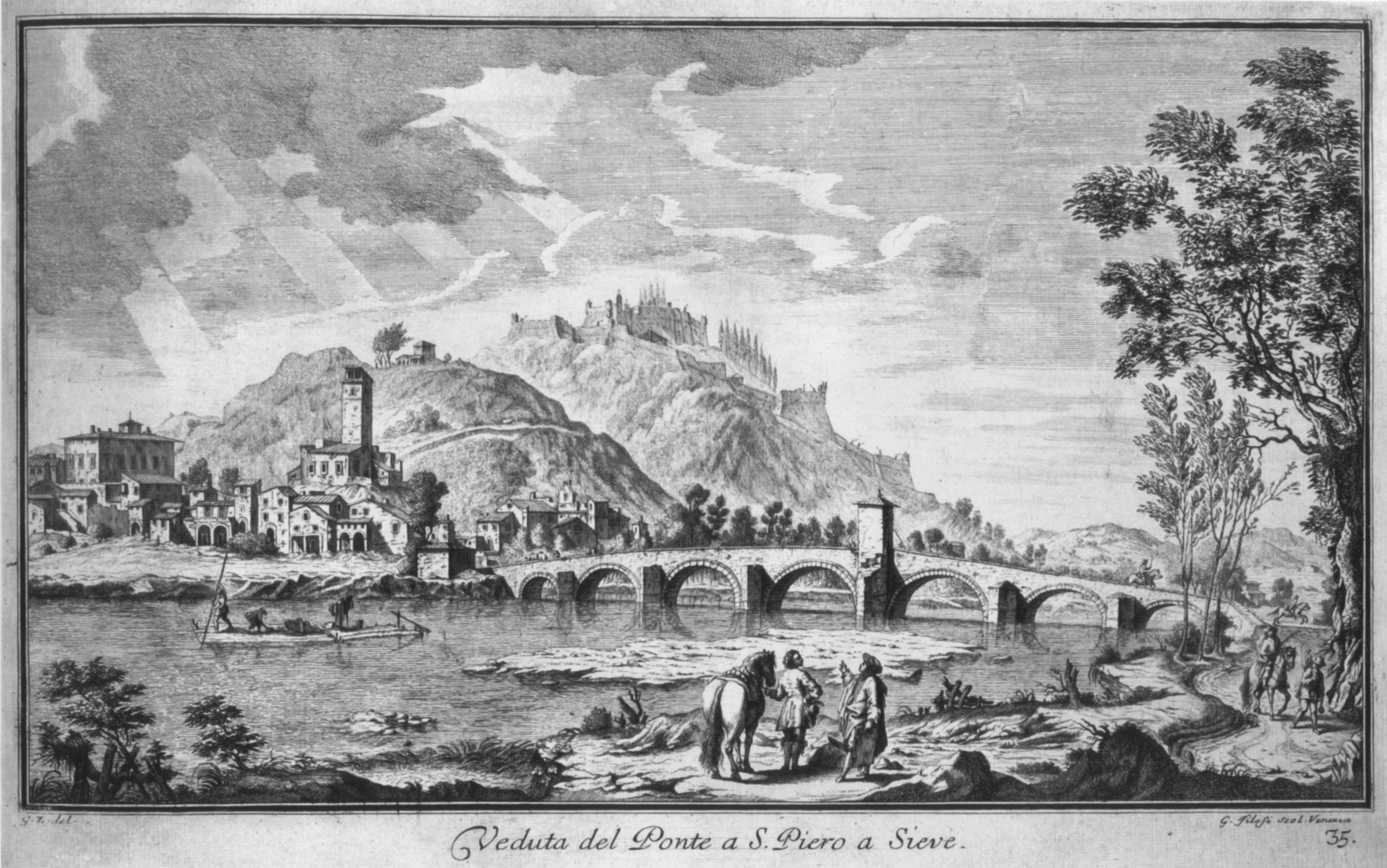 Zocchi, ville 37 san piero a sieve